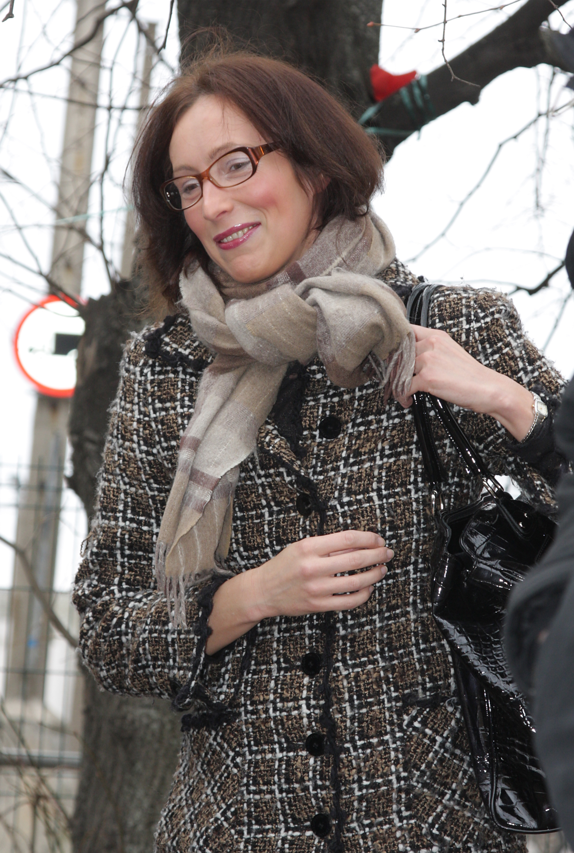 Evelyn Sepp, endine poliitik 2008